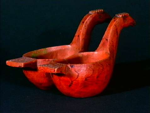 Dobbelt ølfugl fra Singsås, Midtre Gauldal i Sør-Trøndelag . Nå på Norsk Folkemuseum. Lengde 17 cm. NF.1895-1327